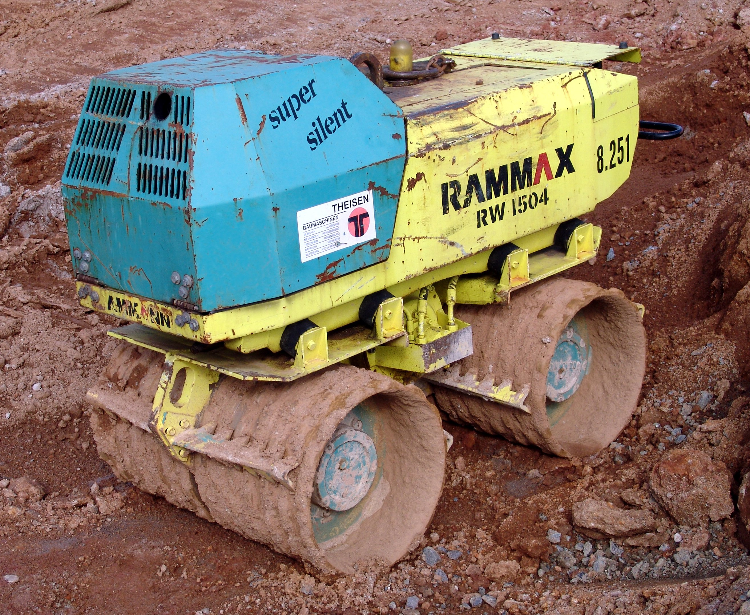 Grabenwalze RAMMAX RW 1504